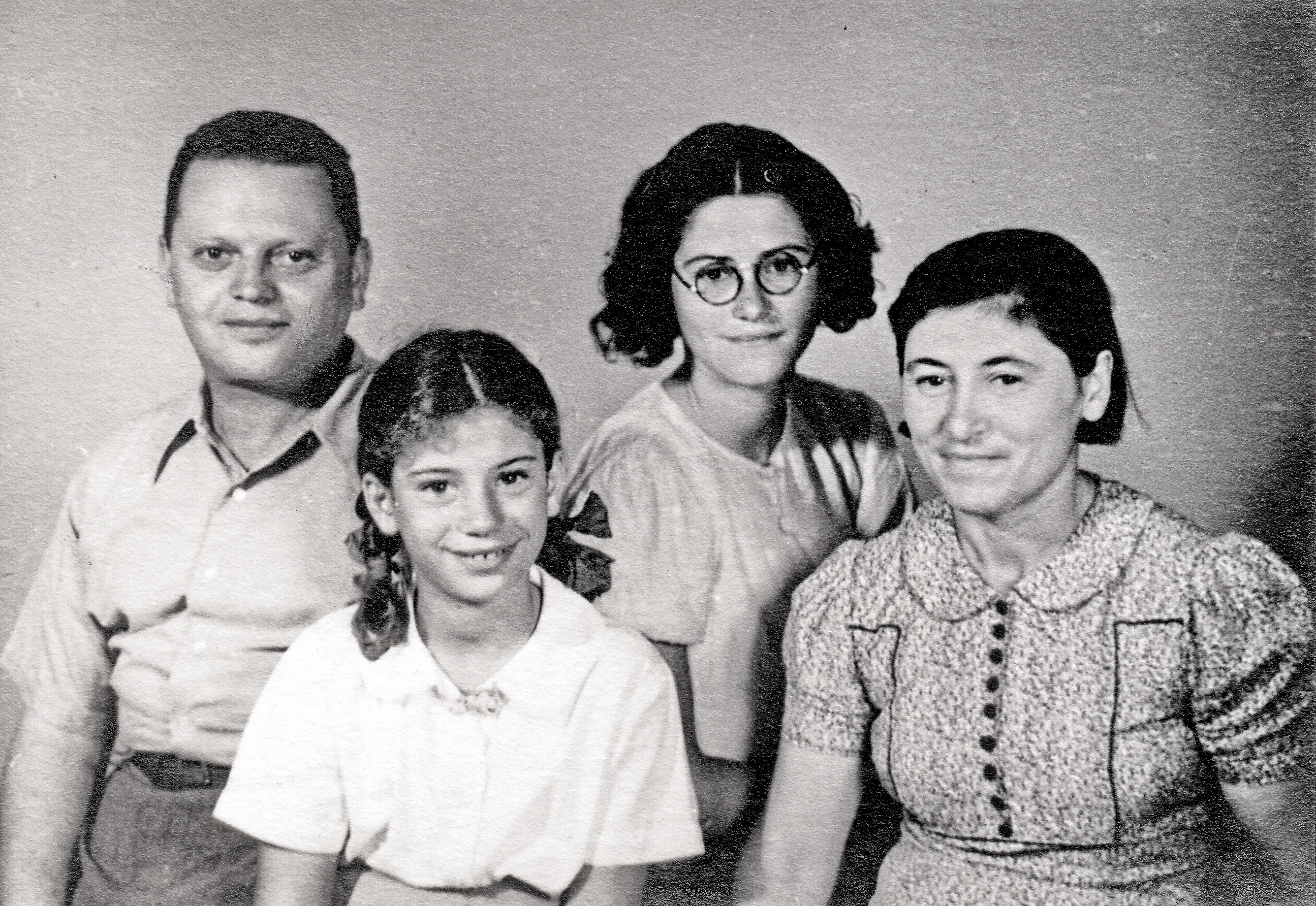 יונה וזאב און ושתי בנותיהם דלילה (עם משקפיים) ויעל. 7.1939 חיפה